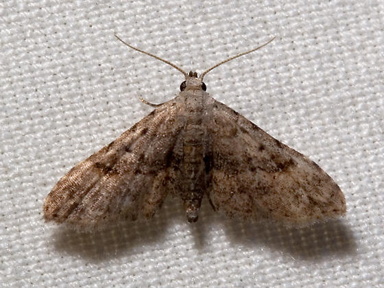 Sigela penumbrata. UT Field Station, Gatlinburg, Sevier County, Tennessee, USA.